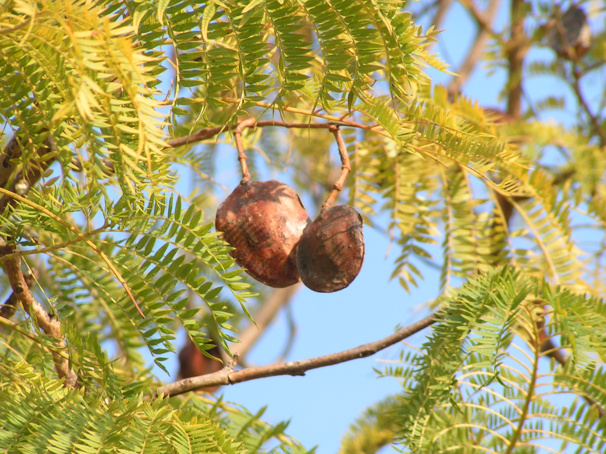 Frutos abiertos y cerrados de jacarandá (Jacaranda mimosifolia)